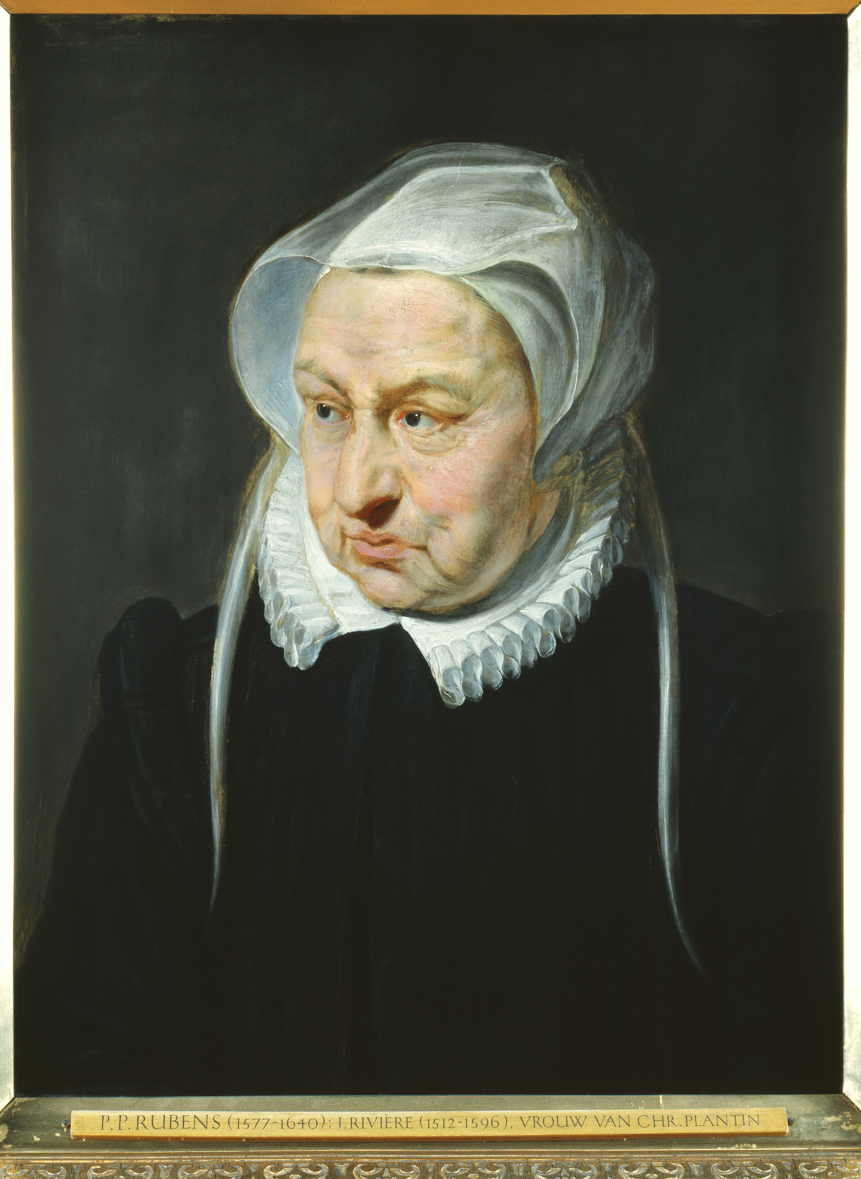 schilderij ( Peter Paul Rubens ( Museum Plantin-Moretus